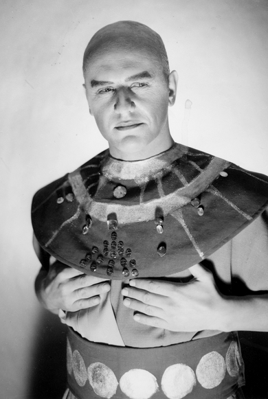 portrett, mann, operasanger, rollebilde, Ramfis i "Aida", halvfigur.